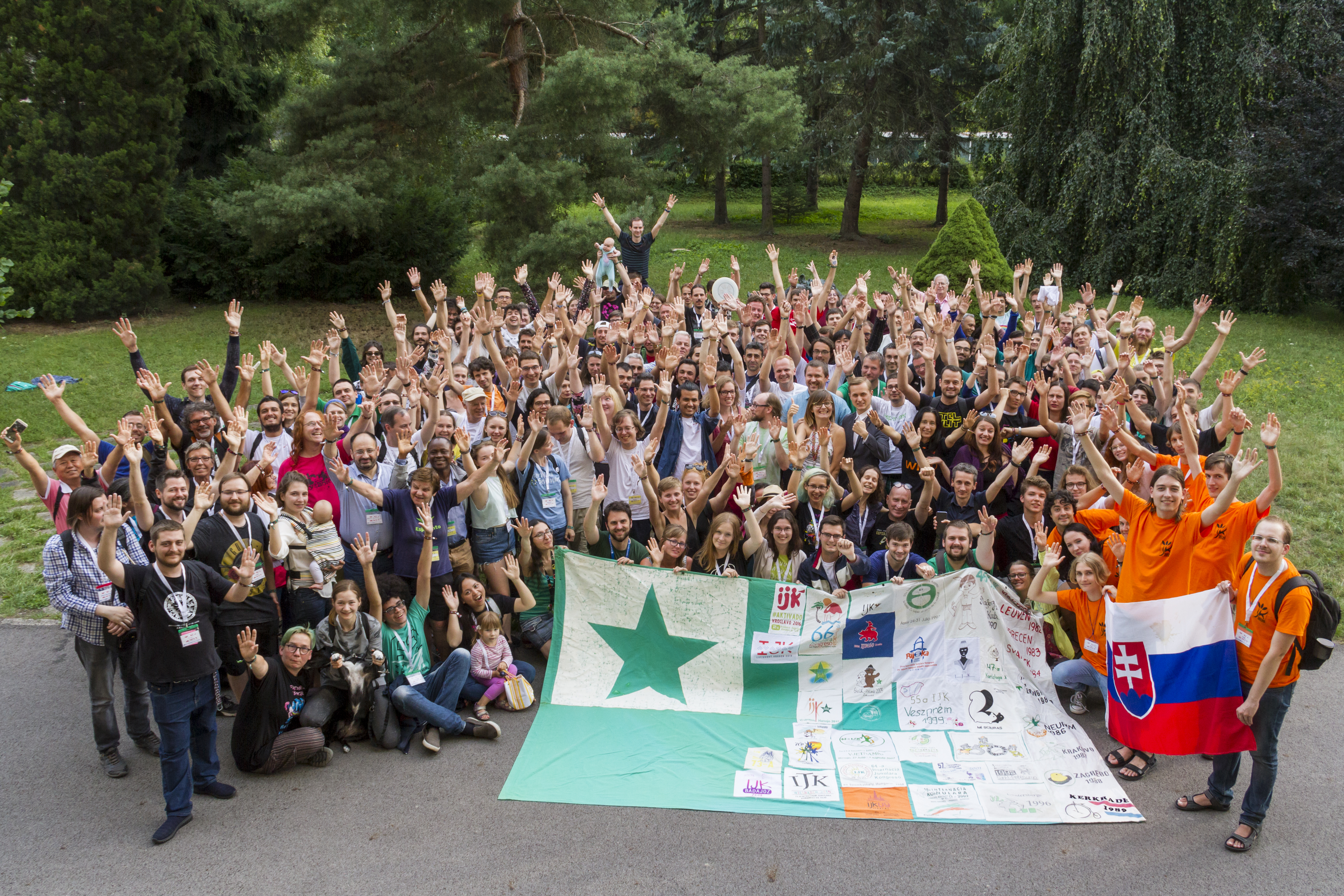 Komuna foto de partoprenantoj de la 75-a Internacia Junulara Kongreso (IJK 2019) de TEJO. Ĝi okazis en Liptovský Hrádok, Slovakio.